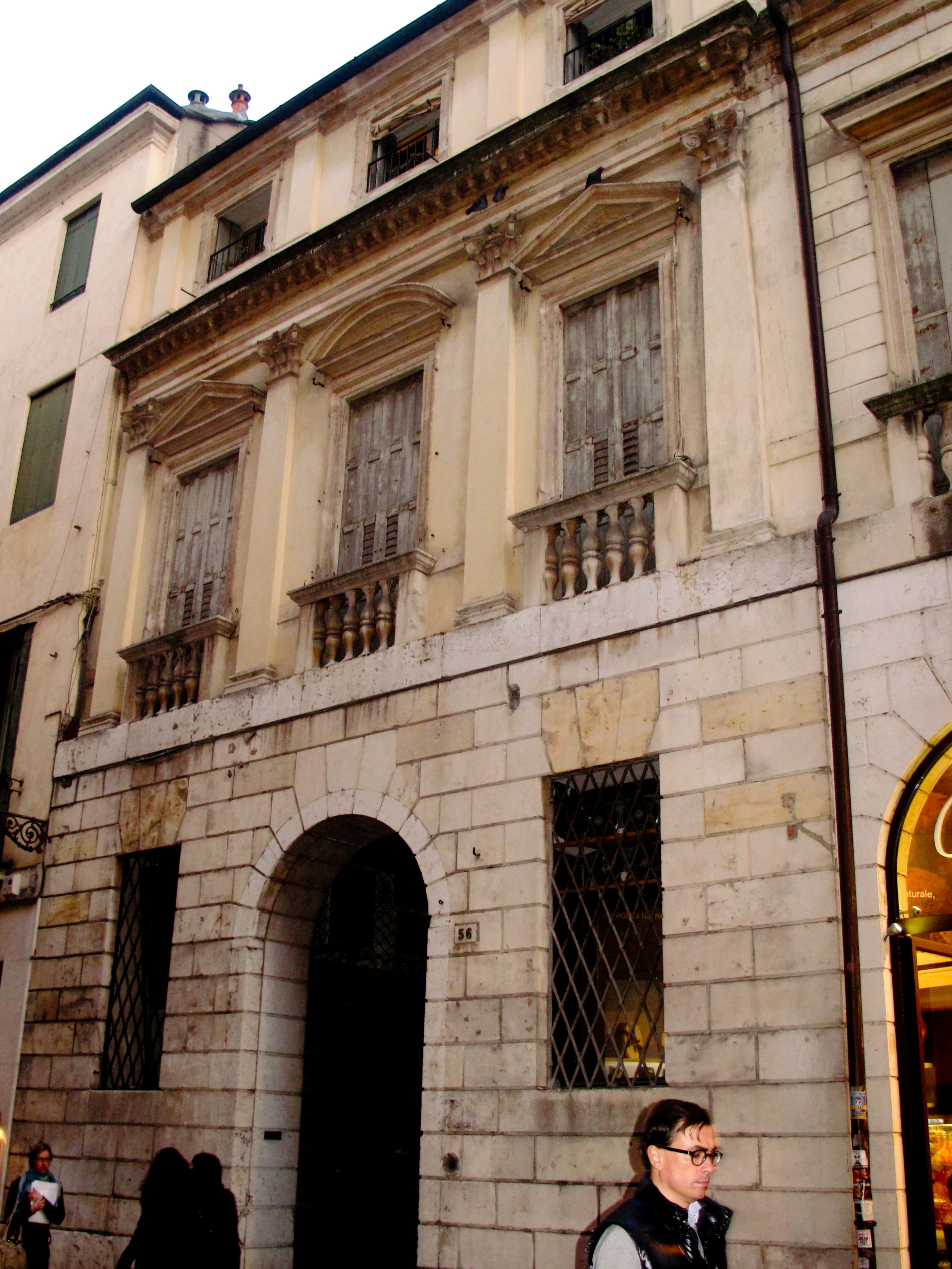 Vicenza, Palazzo Lampertico in corso Palladio 56